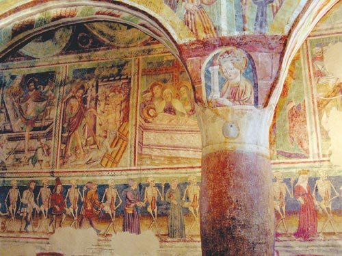 Hrastovlje